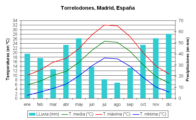 Torrelodones. Gráfico de Climatología.